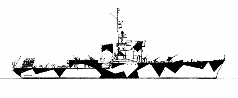 Итальянский корвет "Камошио" в камуфляжной раскраске